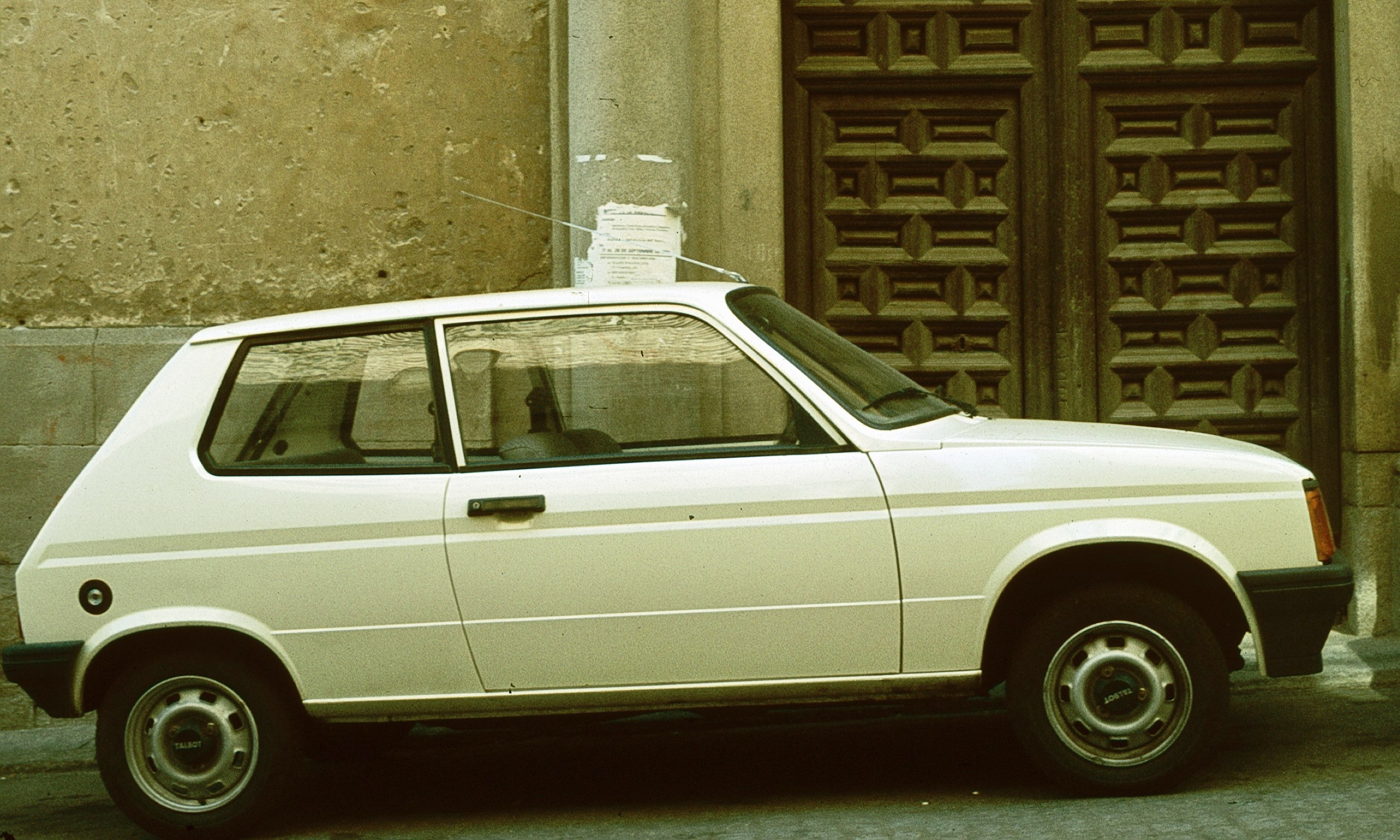 Talbot_Samba_en_Espagne